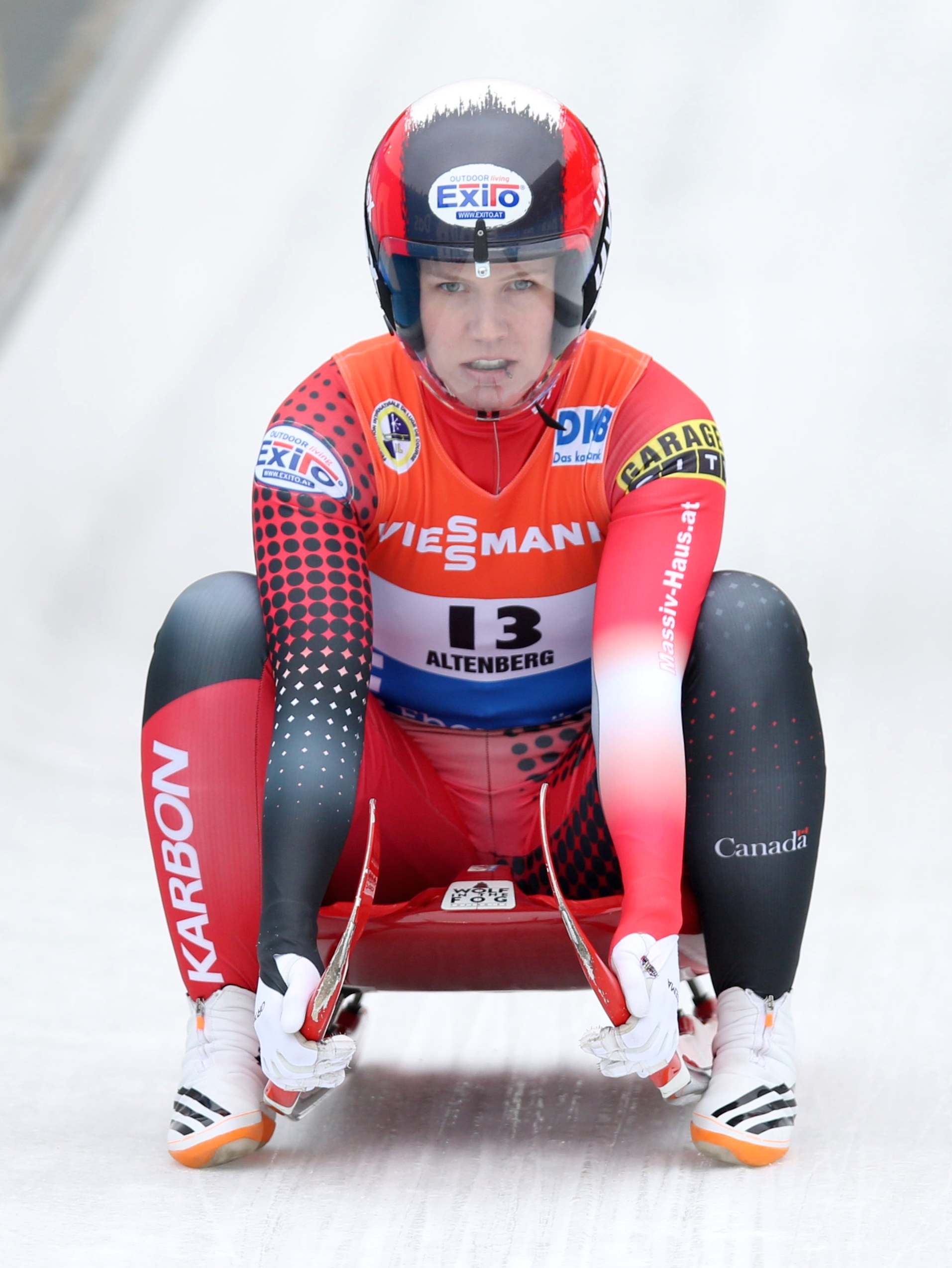 Alex Gough beim Rennrodel-Weltcup der Damen in Altenberg 2017